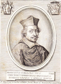 Franz Wilhelm von Wartenberg (1593-1661), Kardinal und Bischof von Regensburg bzw. Osnabrück